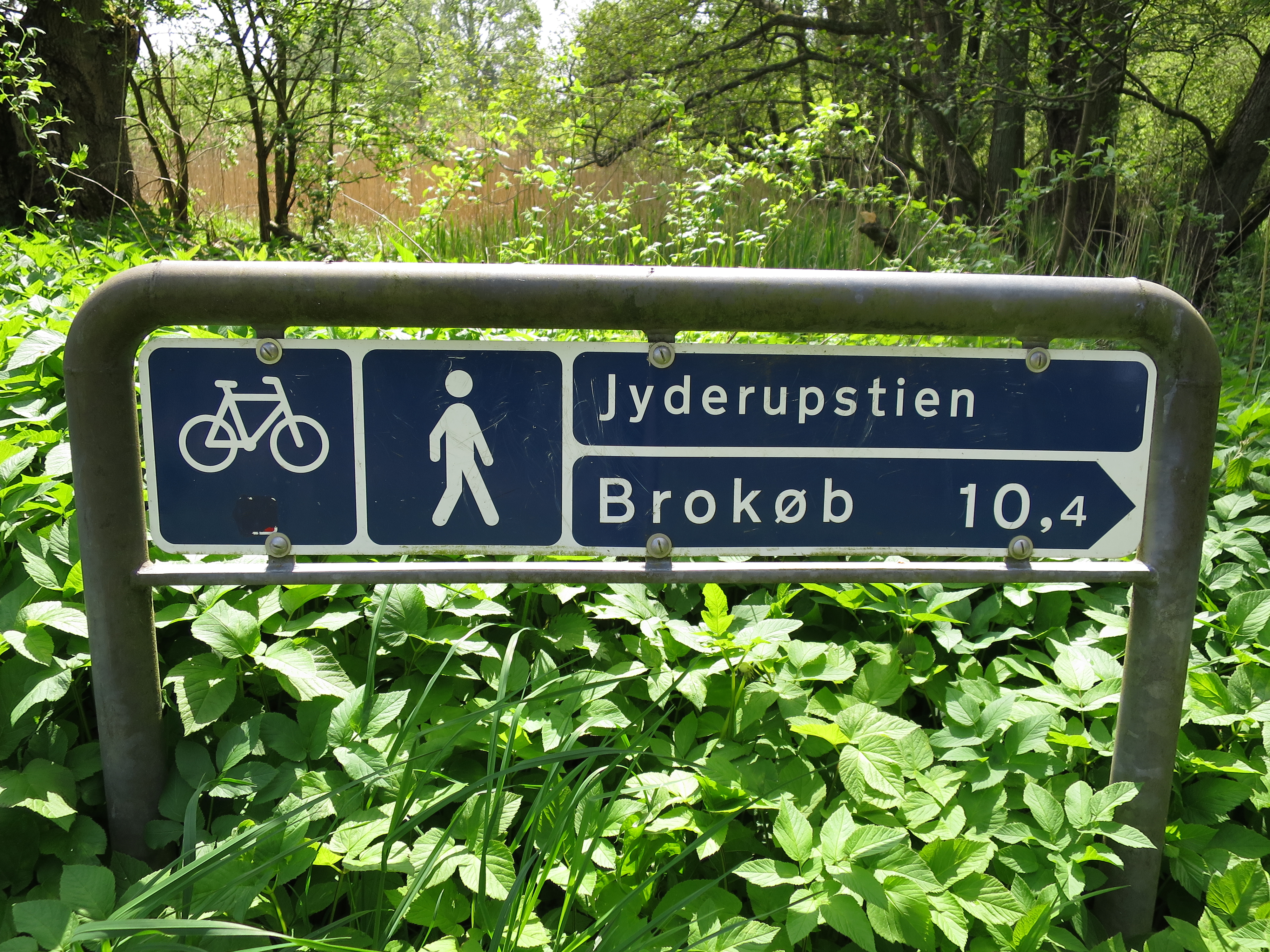 Skiltning på Jyderupstien ved Jyderup.